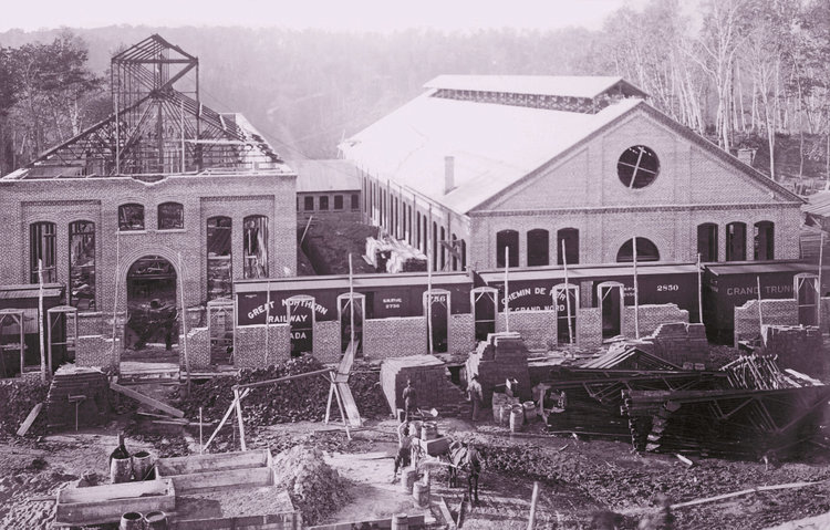 Construction des bâtiments 7 et 9 de l'ancienne aluminerie de Shawinigan au cours de l'été 1900.